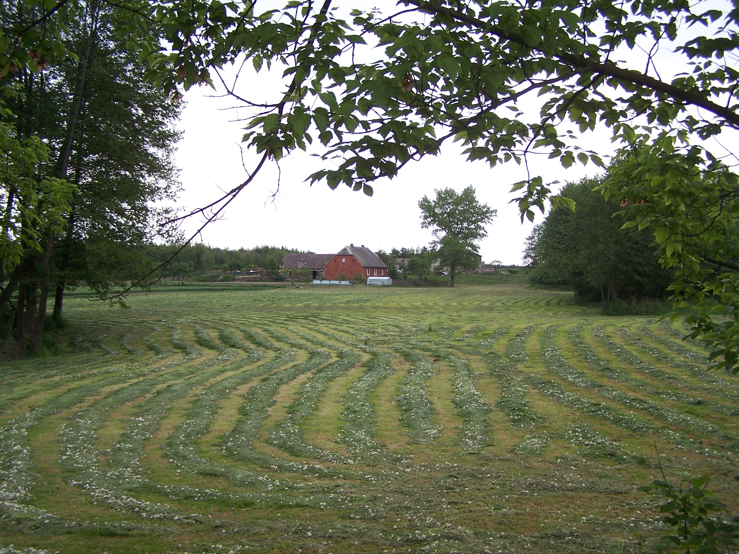 Powiadacze_II